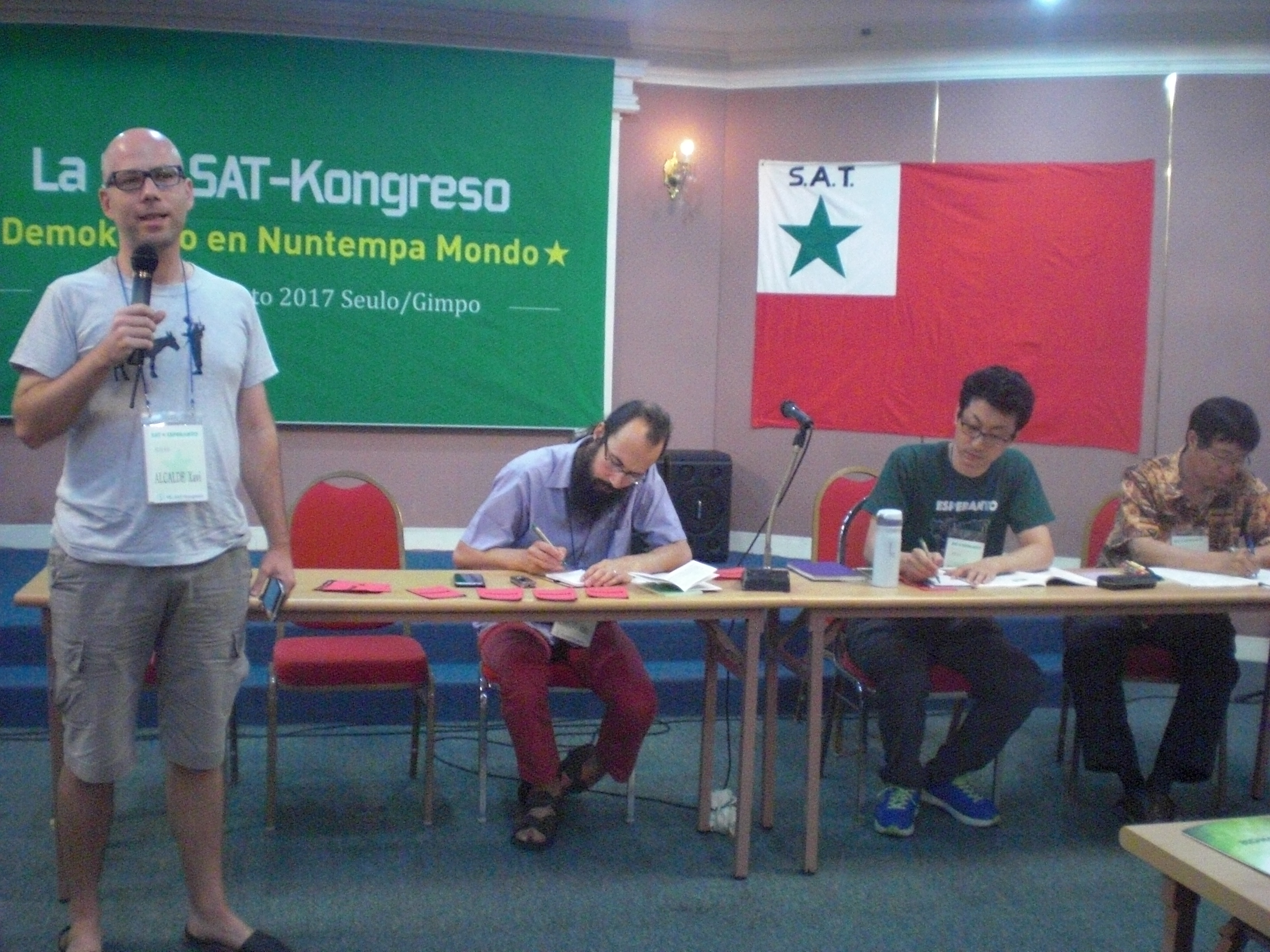 Laborkunsido en Gimpo